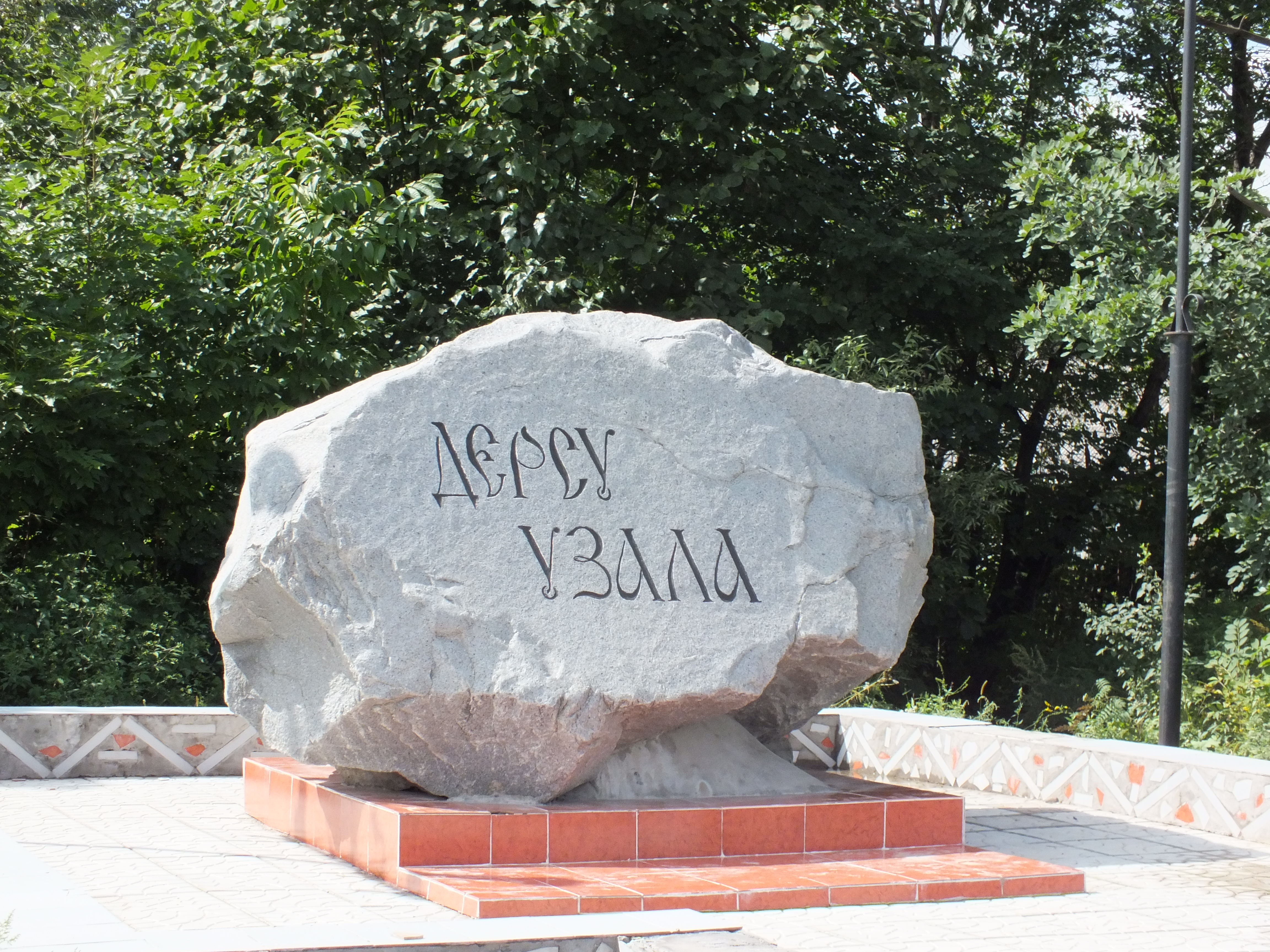 Memorial stone for Dersu Uzala in Korfovsky